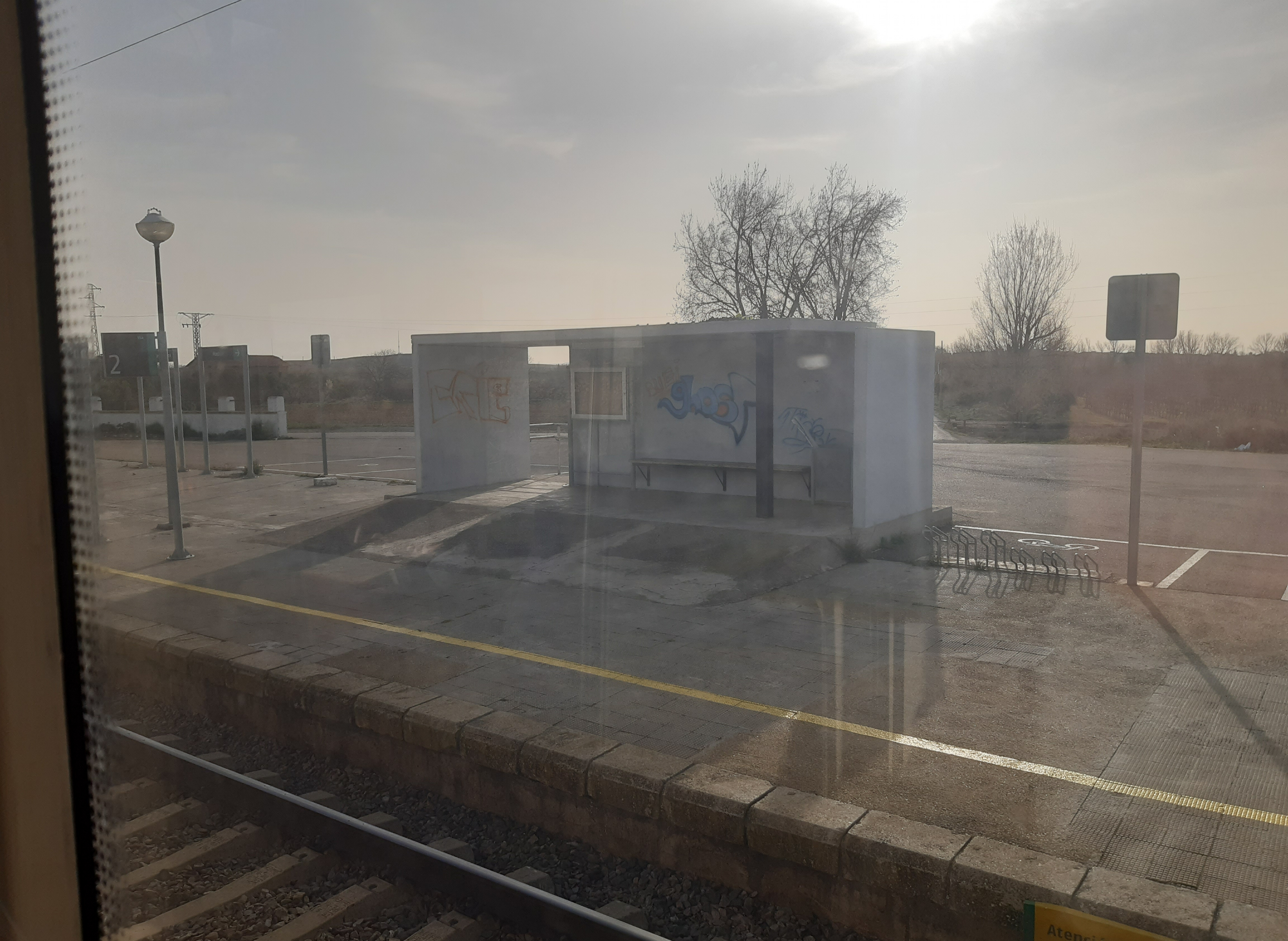 Refugio del apeadero ferroviario de Calatorao, visto desde la vía de sentido Madrid-Chamartín.